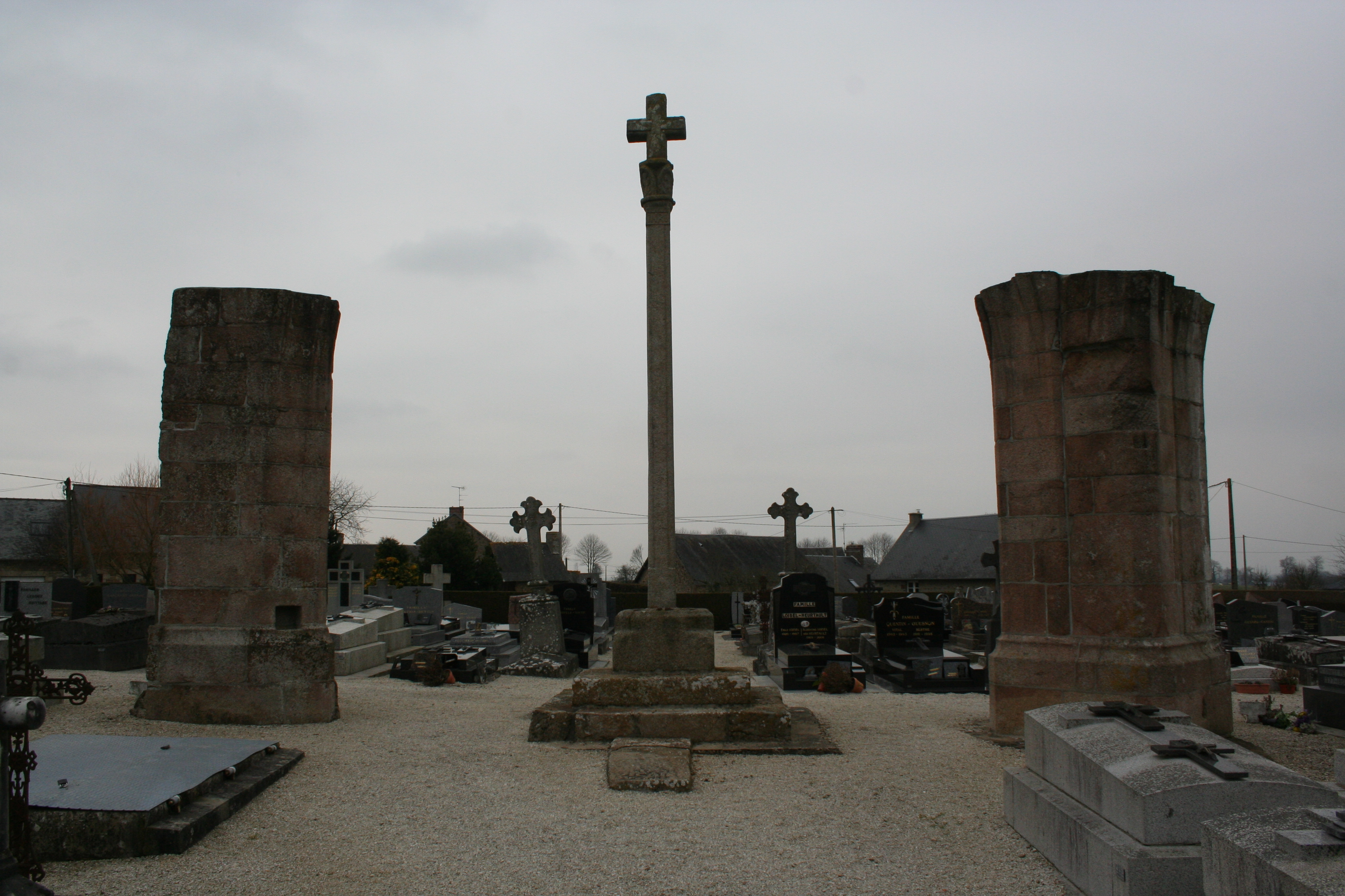 Reste de l'église de Saint-patrice dans le ciemtière du Teileul, Manche, France